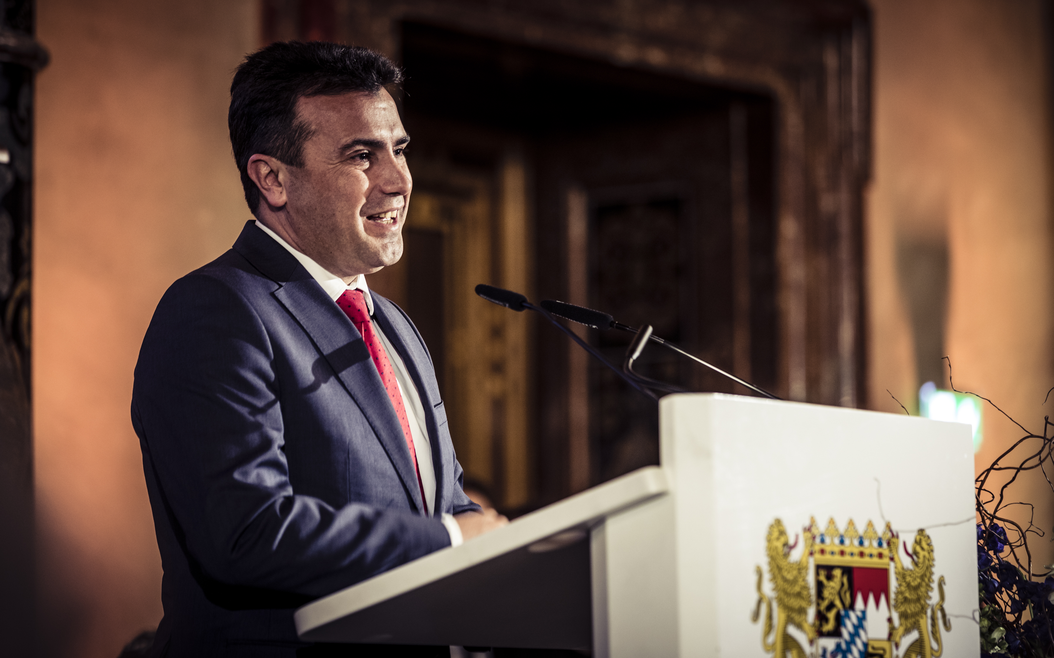 Zoran Zaev während der Münchener Sicherheitskonferenz 2019